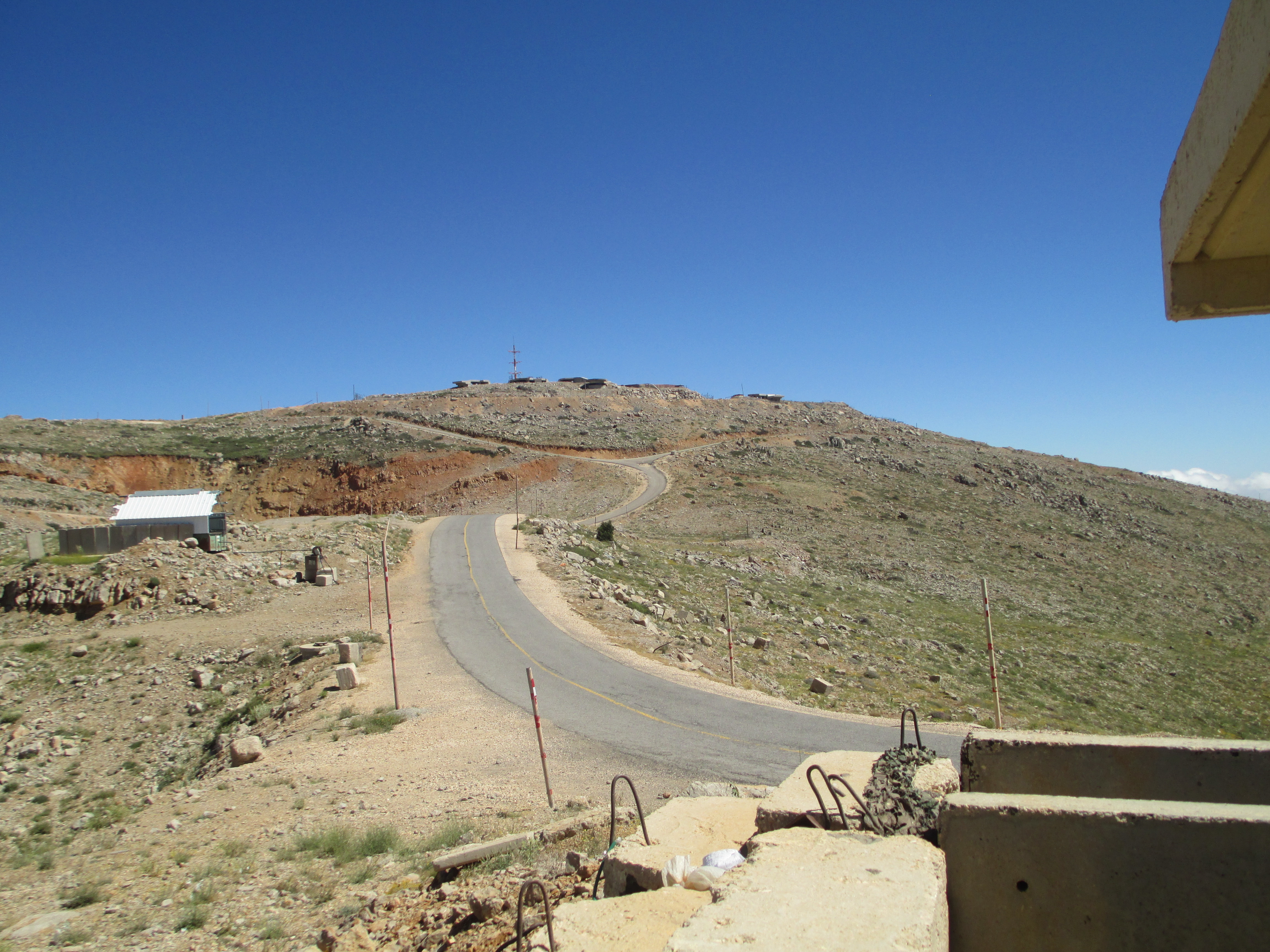 גבעת הקרב (16) על החרמון